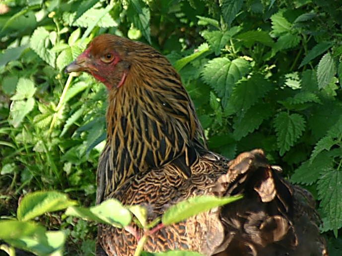 Brahmahenne – rebhuhnfarben